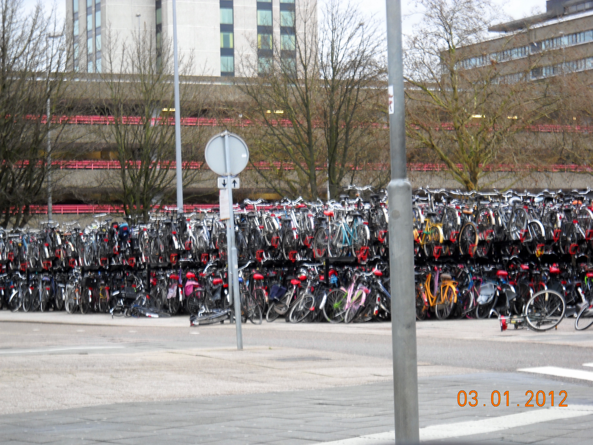 Utrecht